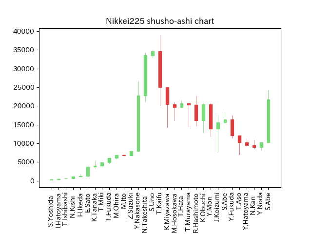 出典：